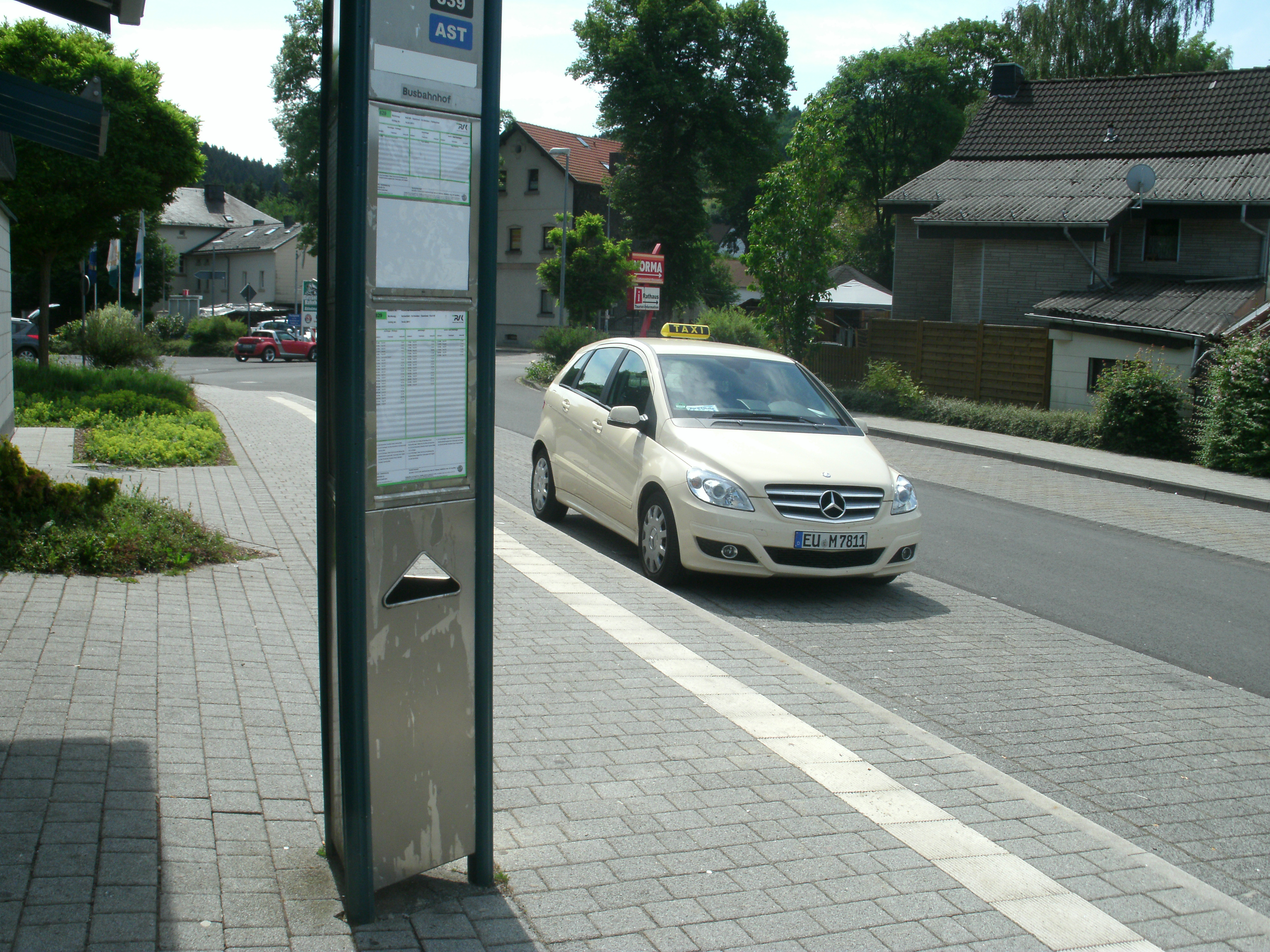 TaxiBus (Anrufbus) im Auftrag der Regionalverkehr Köln (RVK) als Linie 839 am Busbahnhof in Hellenthal.